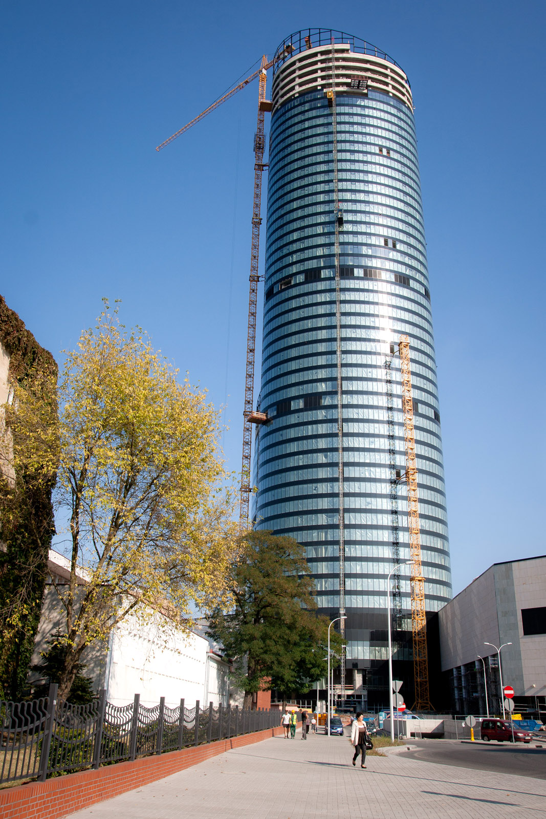 Widok na wieże Skytower od ulicy Kruczej